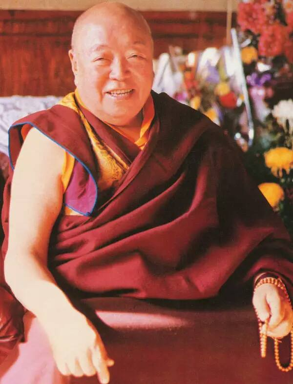 貢唐倉·久美丹貝旺旭（1926年2月－2000年3月1日）男，藏族，四川若爾蓋人，第六世貢唐倉活佛。